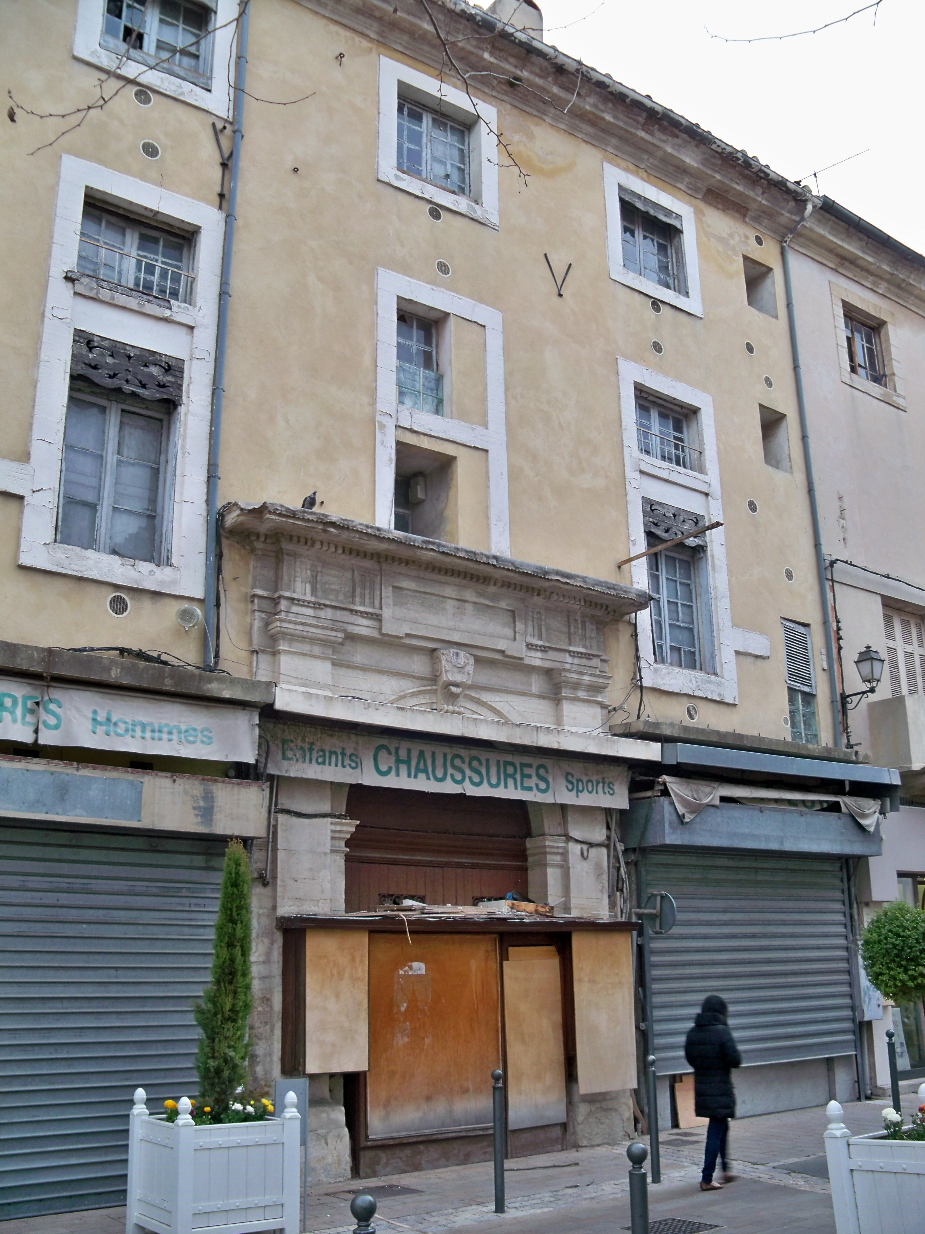 Facade de l'Ancien hôtipal Saint Pierre aux Grâces (Carpentras)